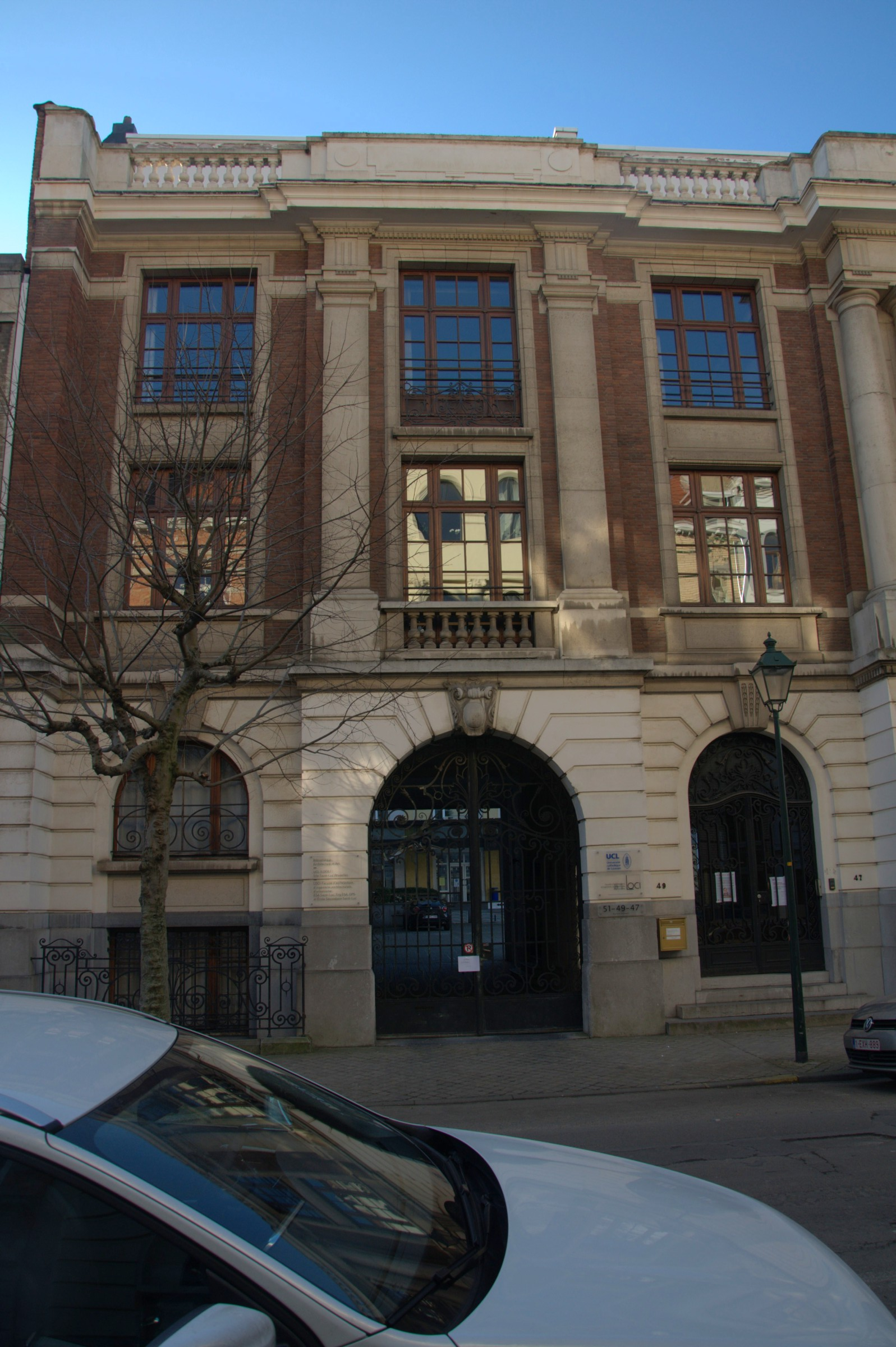 patrimoine immobilier de bruxelles This is a photo of a monument in Brussels, number: 2271-0028/0 Anciens laboratoires pharmaceutiques Sanders, désormais implantation de la faculté d'architecture, d'ingénierie architecturale, d'urbanisme (LOCI) de l'université catholique de Louvain (UCLouvain), en tant que campus UCLouvain Bruxelles Saint-Gilles.